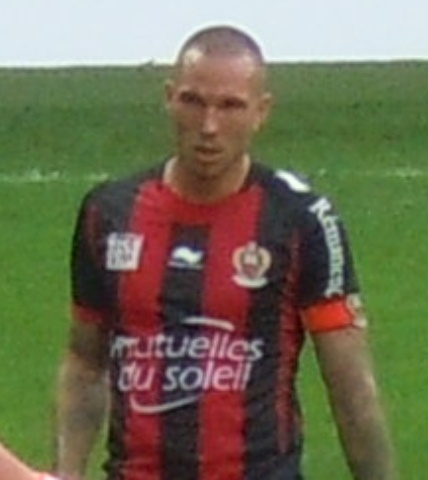 Didier Digard sous les couleurs de l'OGCN